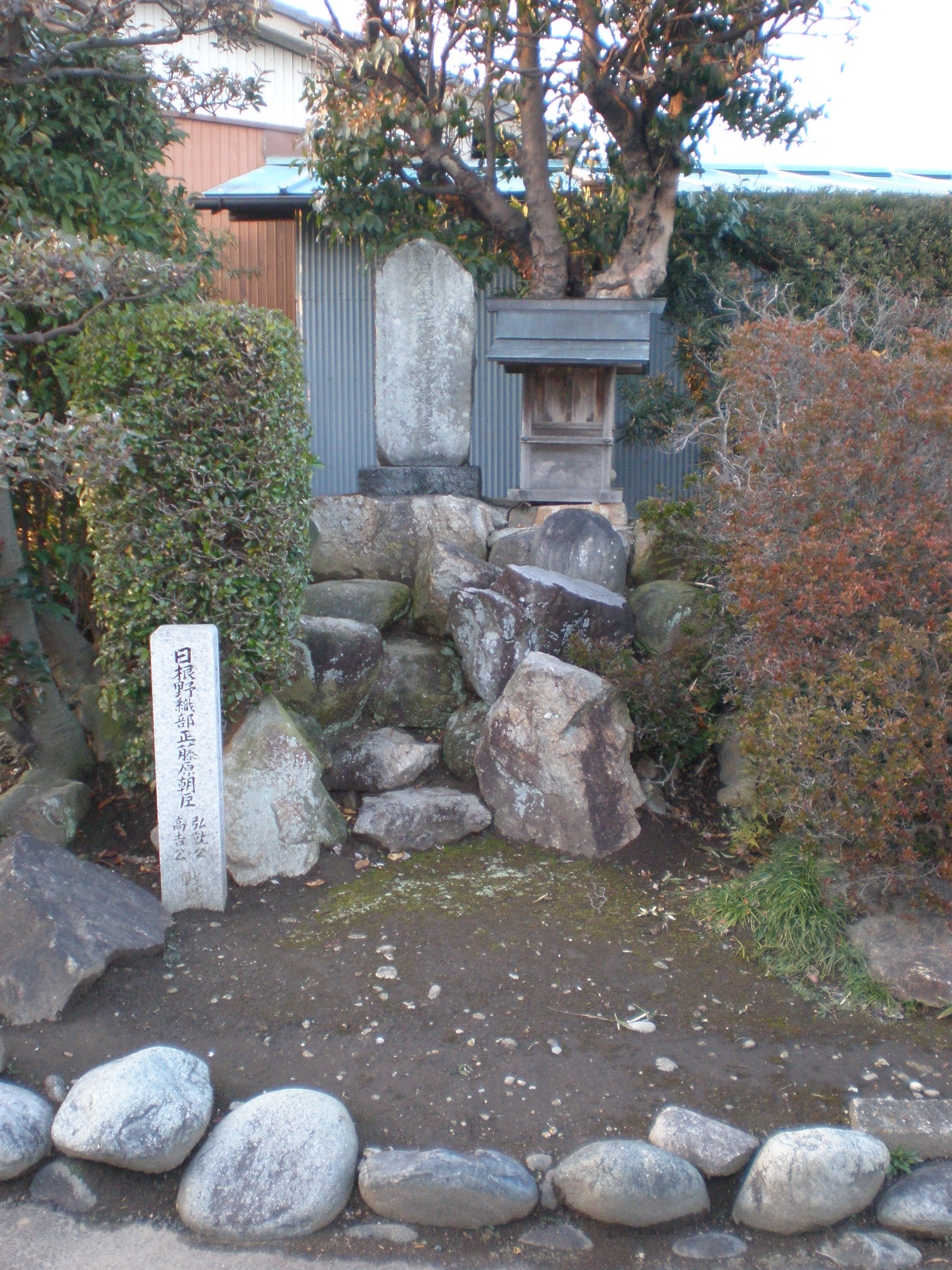 愛知県小牧市にある二重堀砦跡（日根野備中守弘就砦跡）